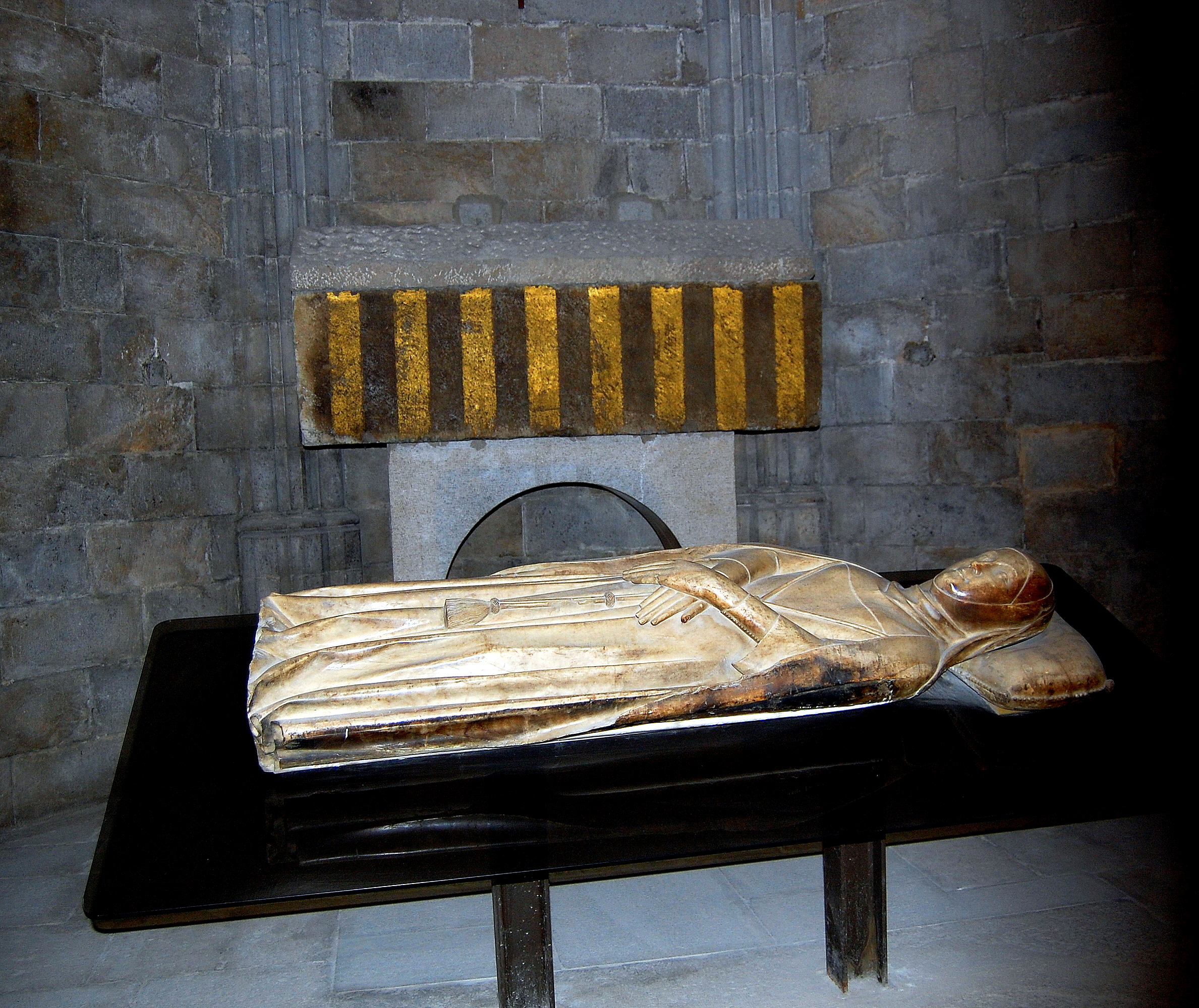 Catedral de Santa Maria (Girona)